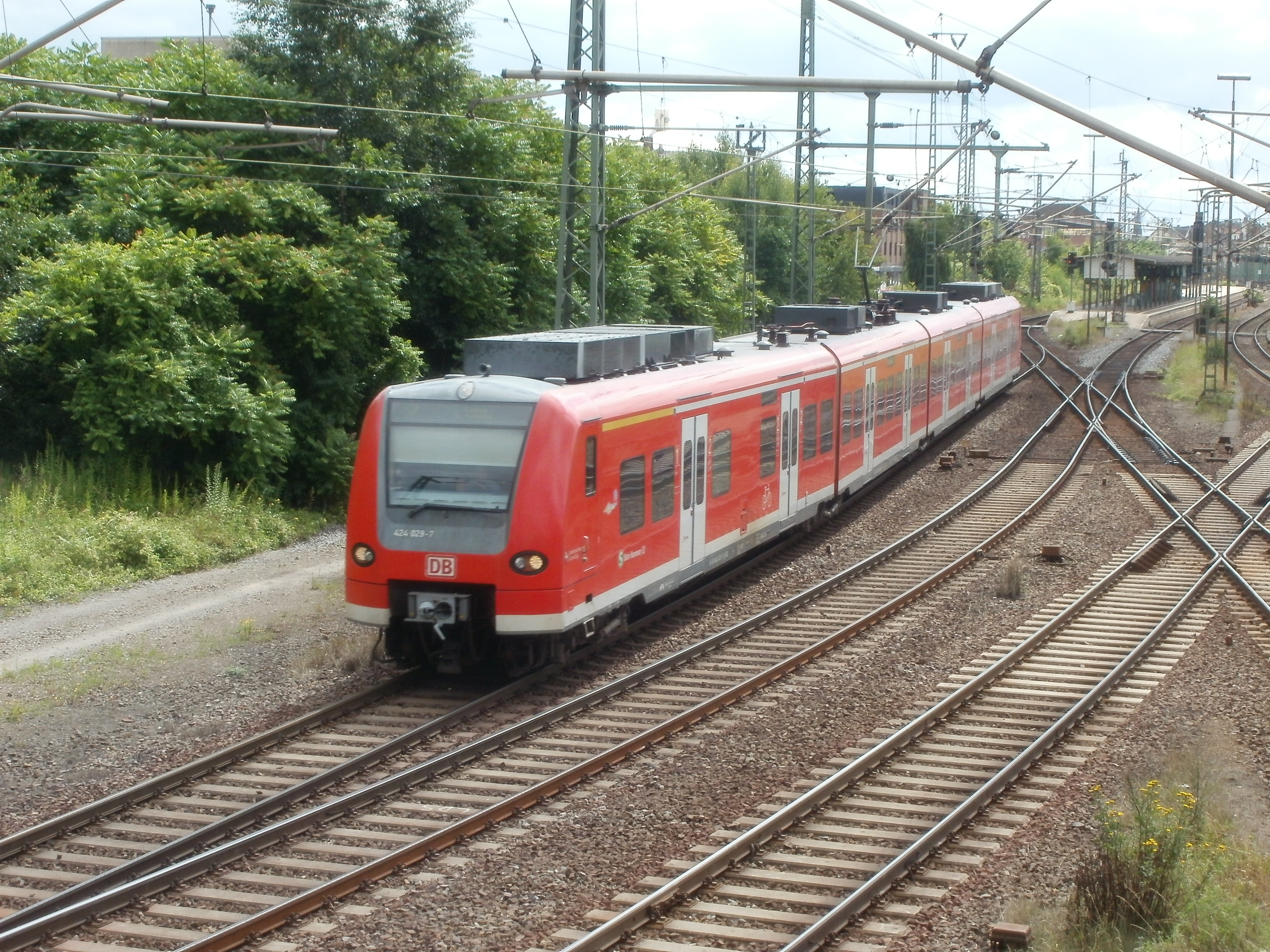 Zug der S-Bahn Hannover am Bahnhof Lehrte.